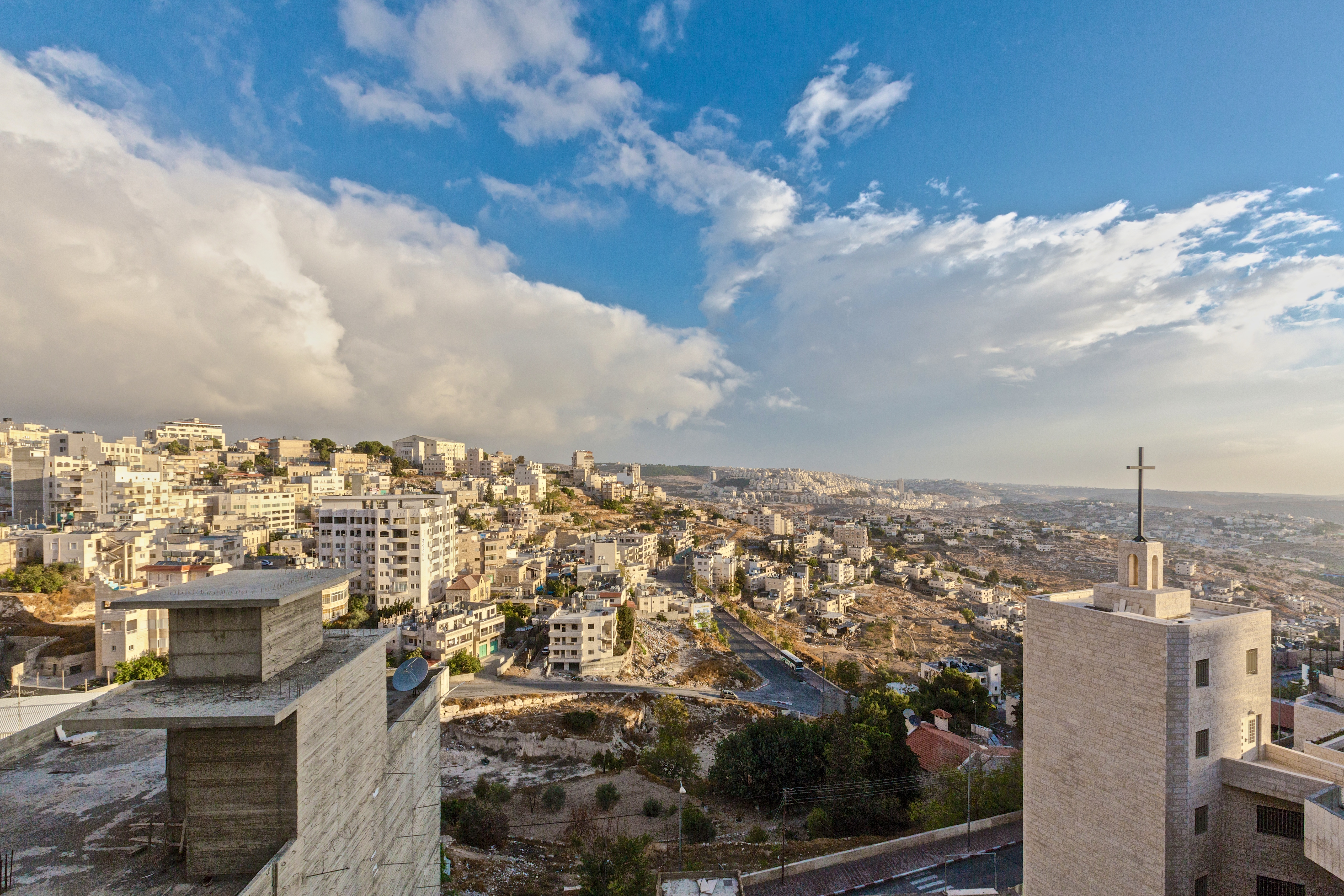 Bethlehem